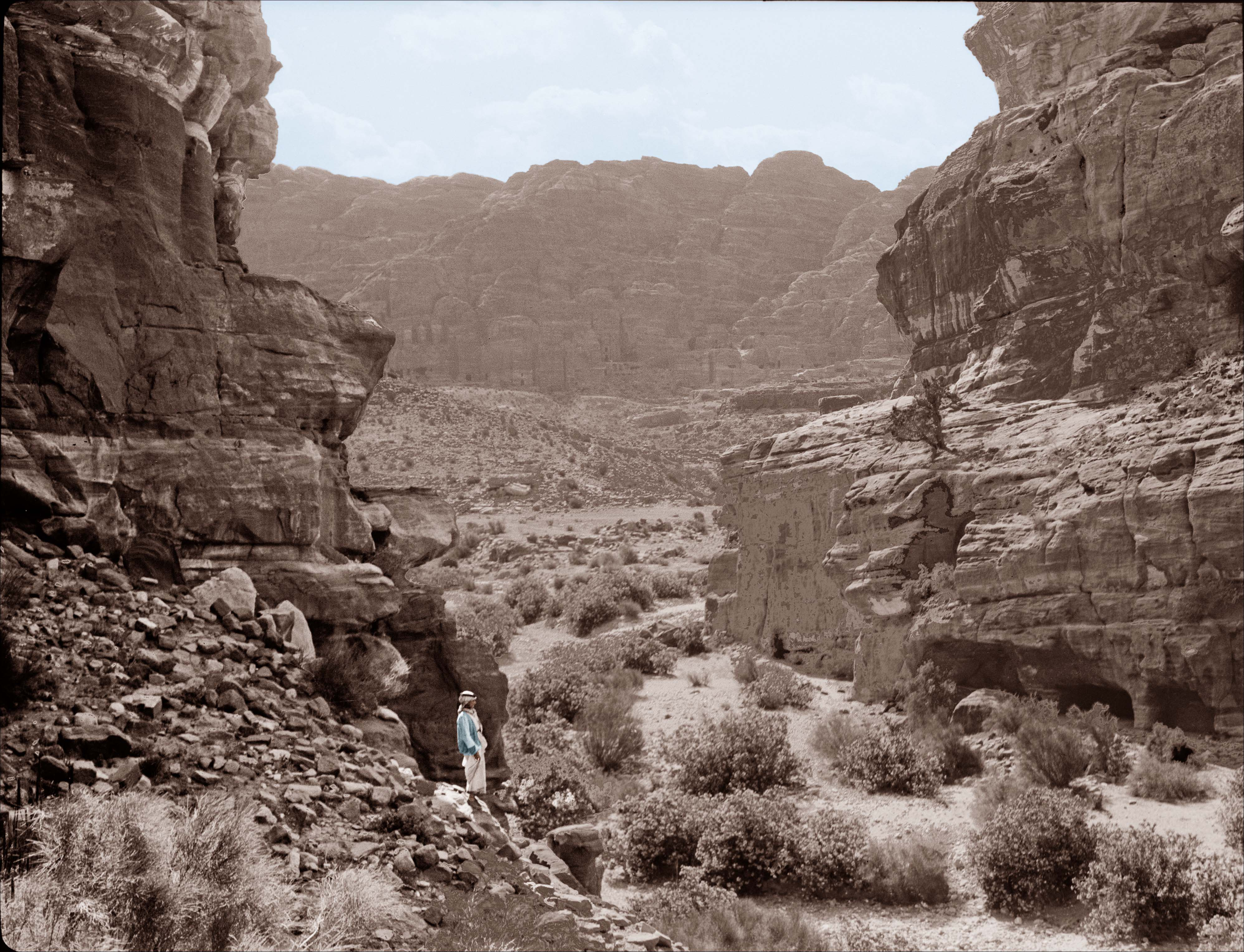 La vallée Es Siyyah. Le wadi Siyyah et en bas le wadi Musa. Le djebel Khubthah au fond.